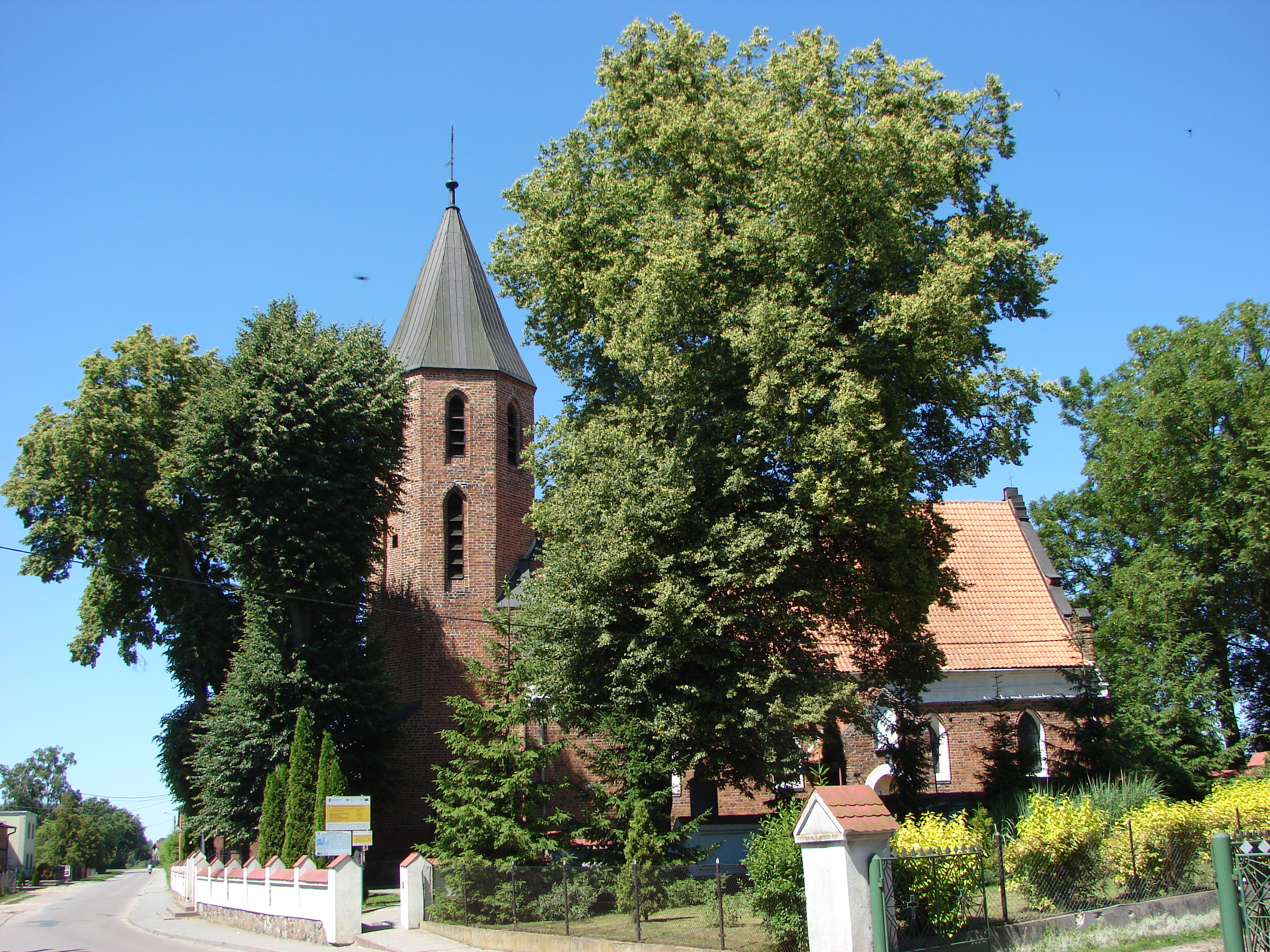 Nieżywięć, Gmina Bobrowo, powiat brodnicki.